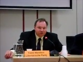 Waarom mensen op de Libertarische partij moeten stemmen.